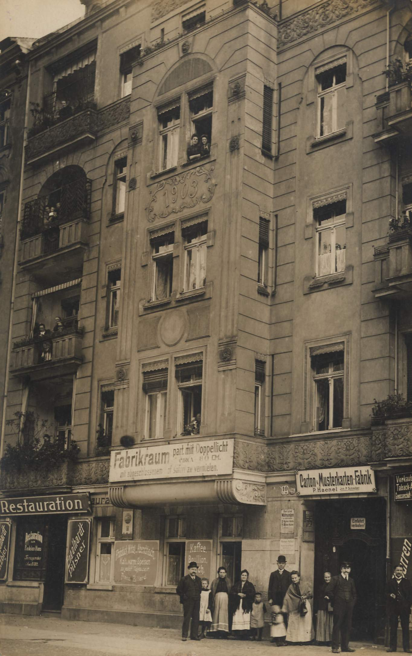 Carton und Musterkarten-Fabrik P. Haenel, Hennigsdorfer Straße 10 (heute Groninger Straße) in Berlin-Wedding